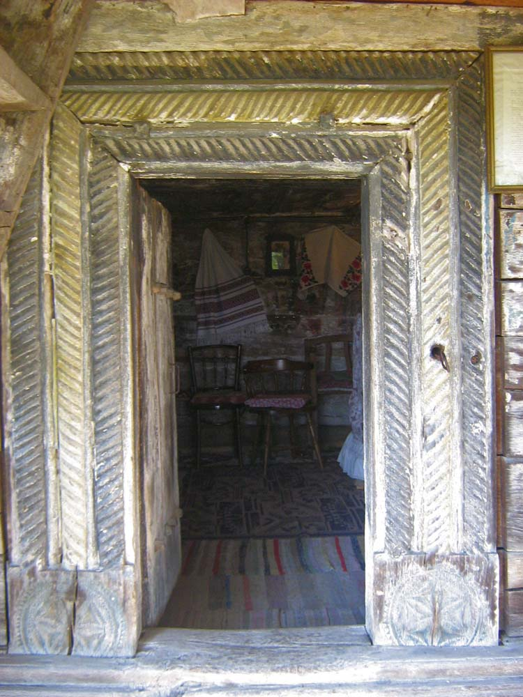 Portalul sculptat la intrare în biserica de lemn din Creaca, Sălaj.